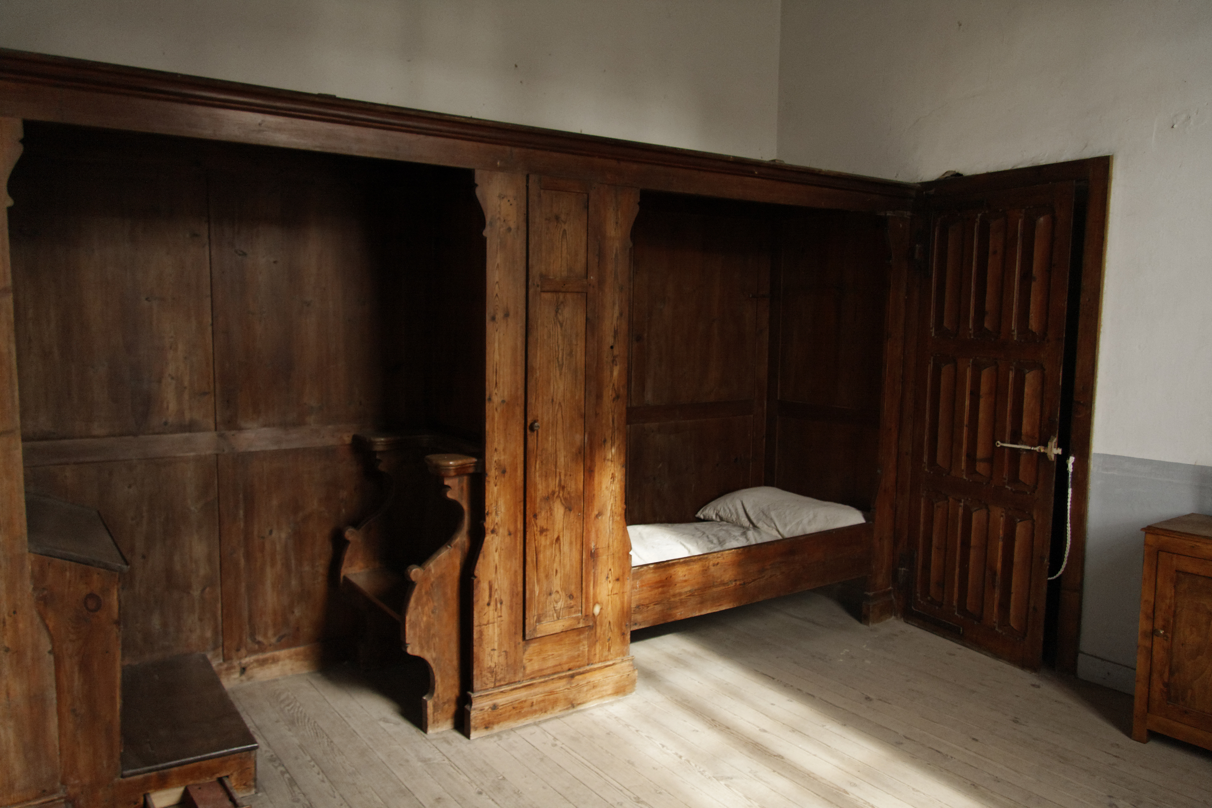 A l'intérieur d'une cellule d'un chartreux